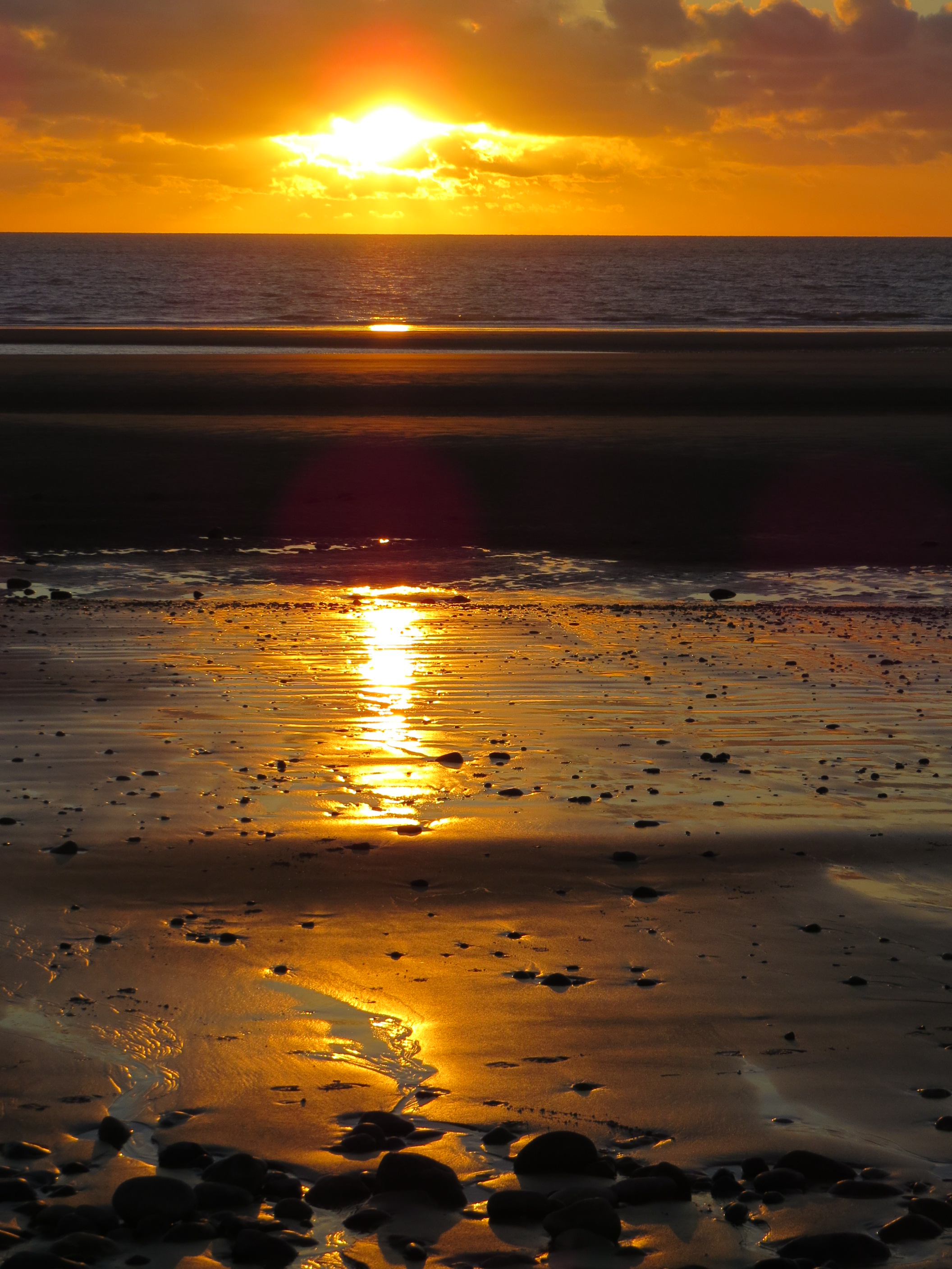 machlud haul o'r traeth